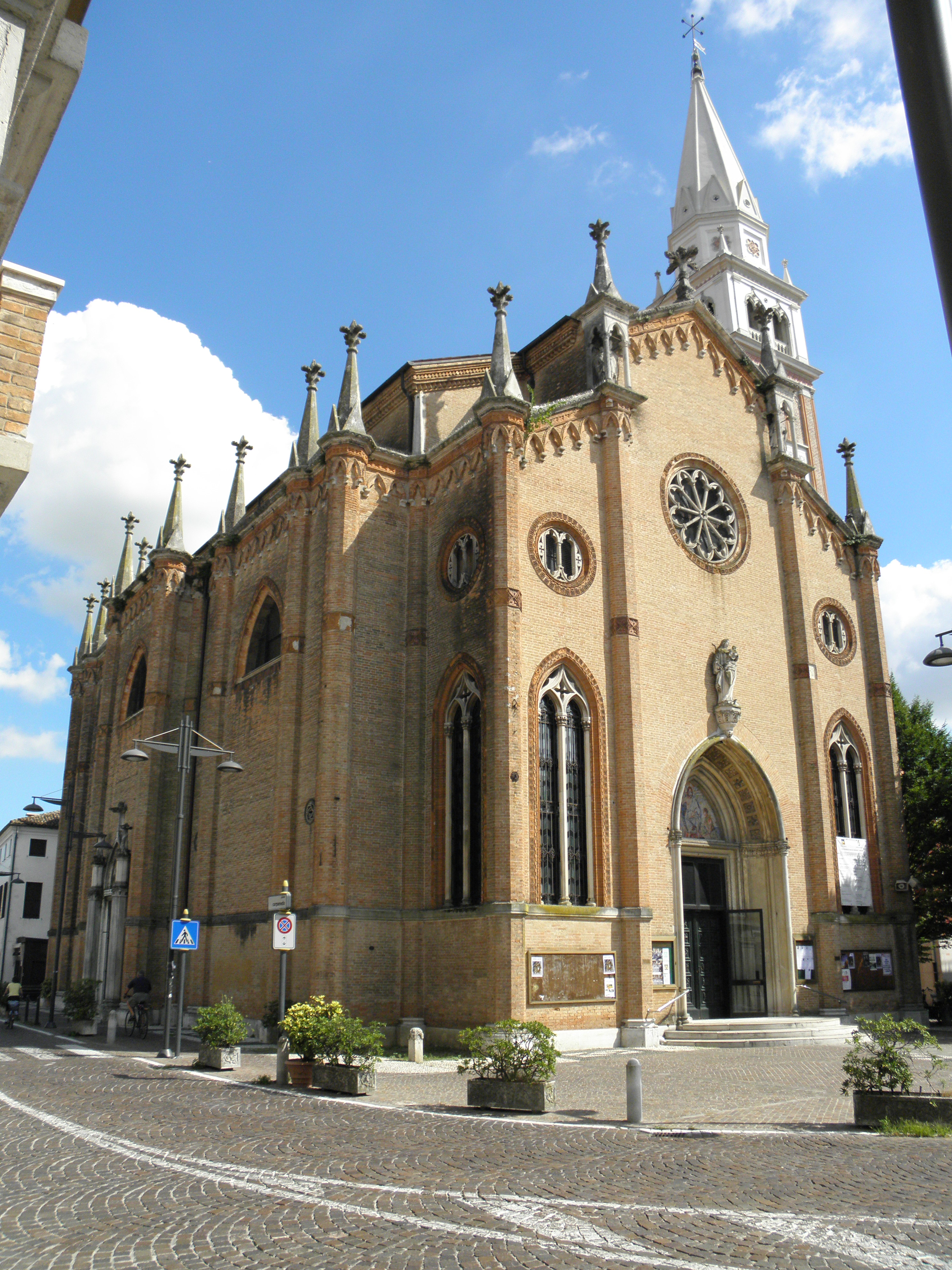 Carpenedo, frazione di Venezia nel tessuto urbano di Mestre: la chiesa parrocchiale dei Santi Gervasio e Protasio.